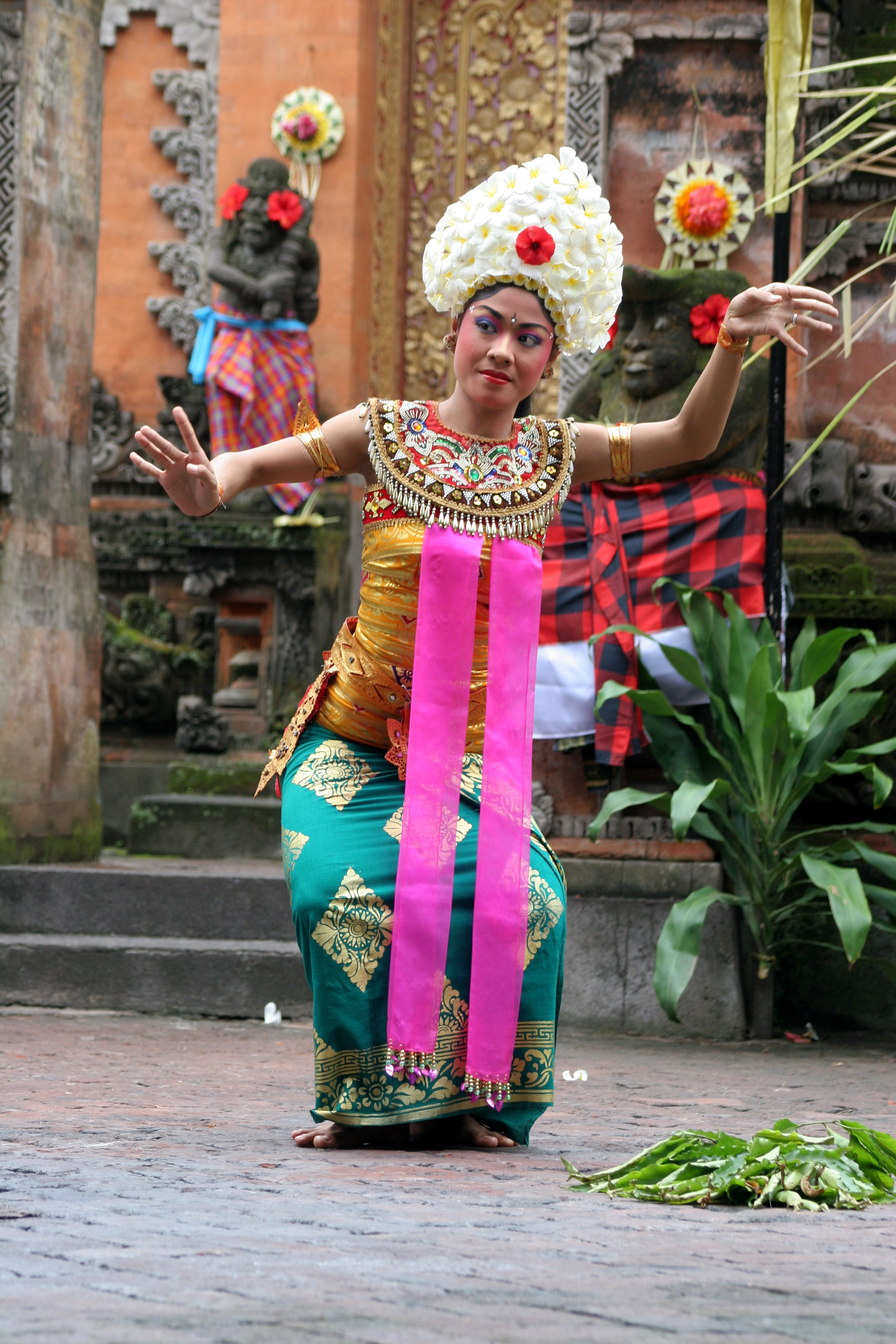 Bali route d'ubud danseuse de la danse du Barong